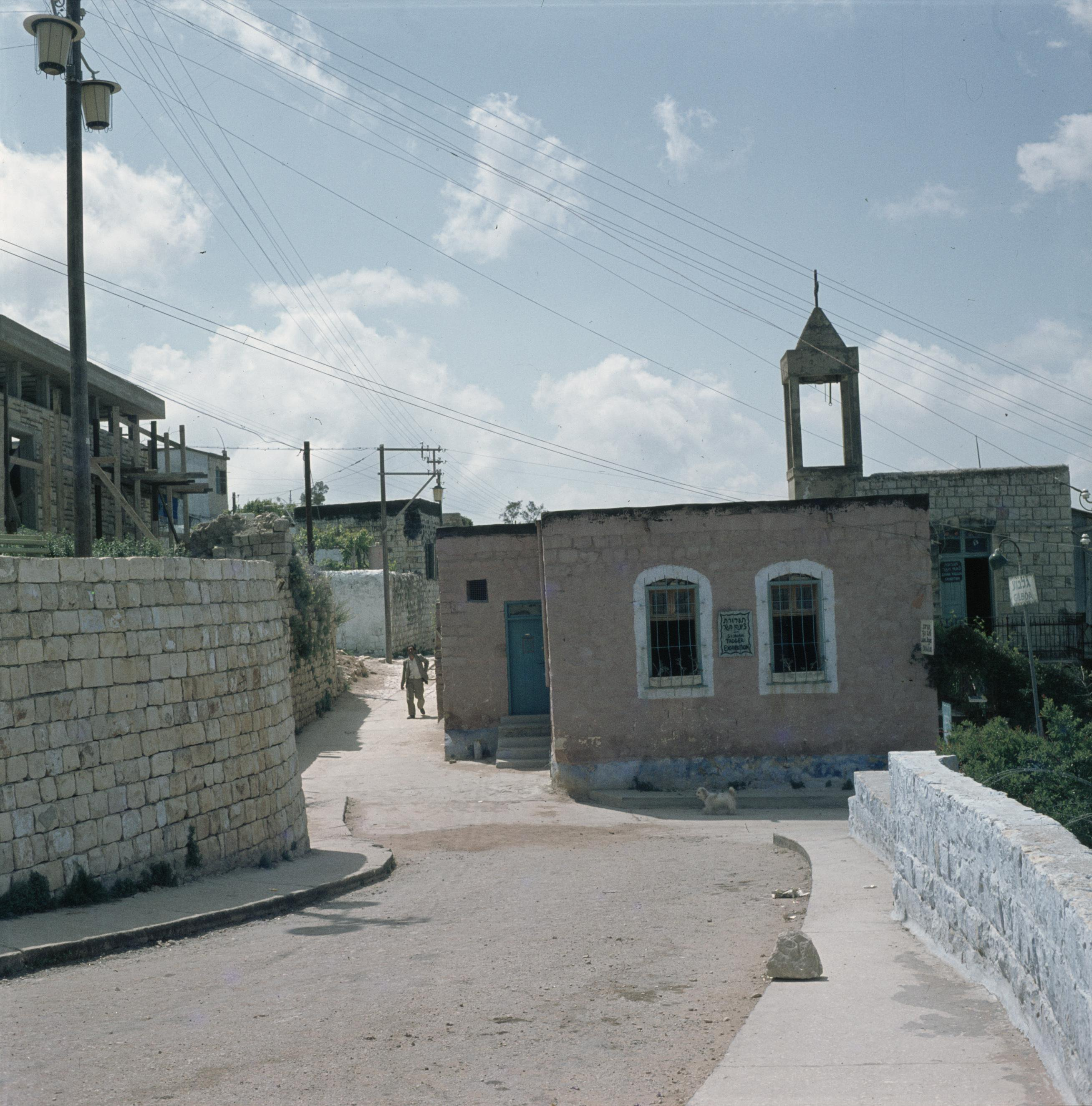 Collectie / Archief : Fotocollectie Van de Poll Reportage / Serie : [ onbekend ] Beschrijving : Safed. Kunstenaarskolonie: weg met aan weerzijden muren met zicht op het atelier van Sionah Tagger en een kapel met torentje Datum : ongedateerd Locatie : Israël, Safad Trefwoorden : ateliers, christendom, kapellen, kunstenaarskolonies, muren, naamborden, straatbeelden, wegen Persoonsnaam : Tagger, Sionah Fotograaf : Poll, Willem van de, [onbekend] Auteursrechthebbende : Nationaal Archief Materiaalsoort : Negatief (zwart/wit) Nummer archiefinventaris : bekijk toegang 2.24.14.02 Bestanddeelnummer : 255-9230